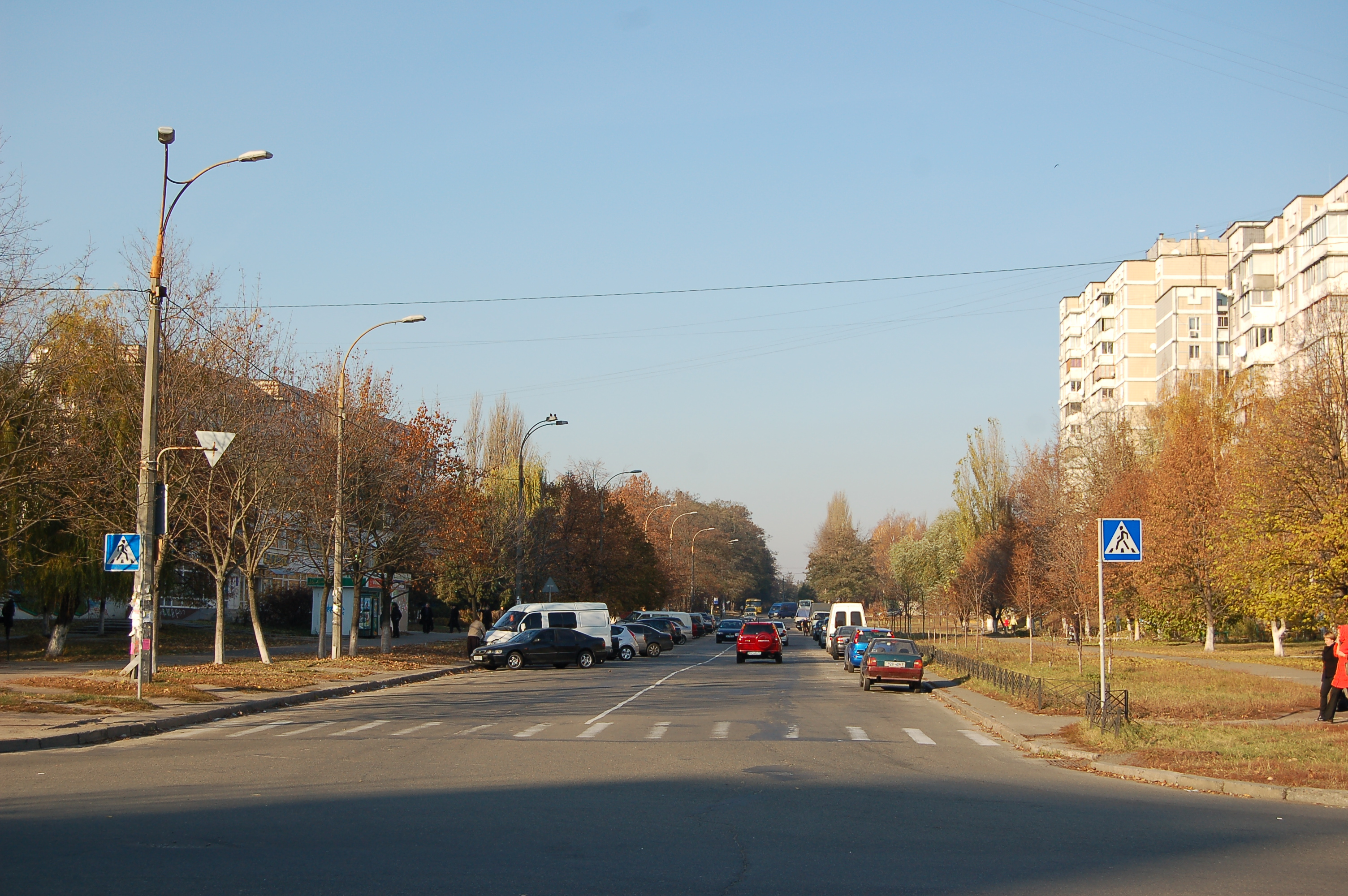 Підлісна вулиця у Києві